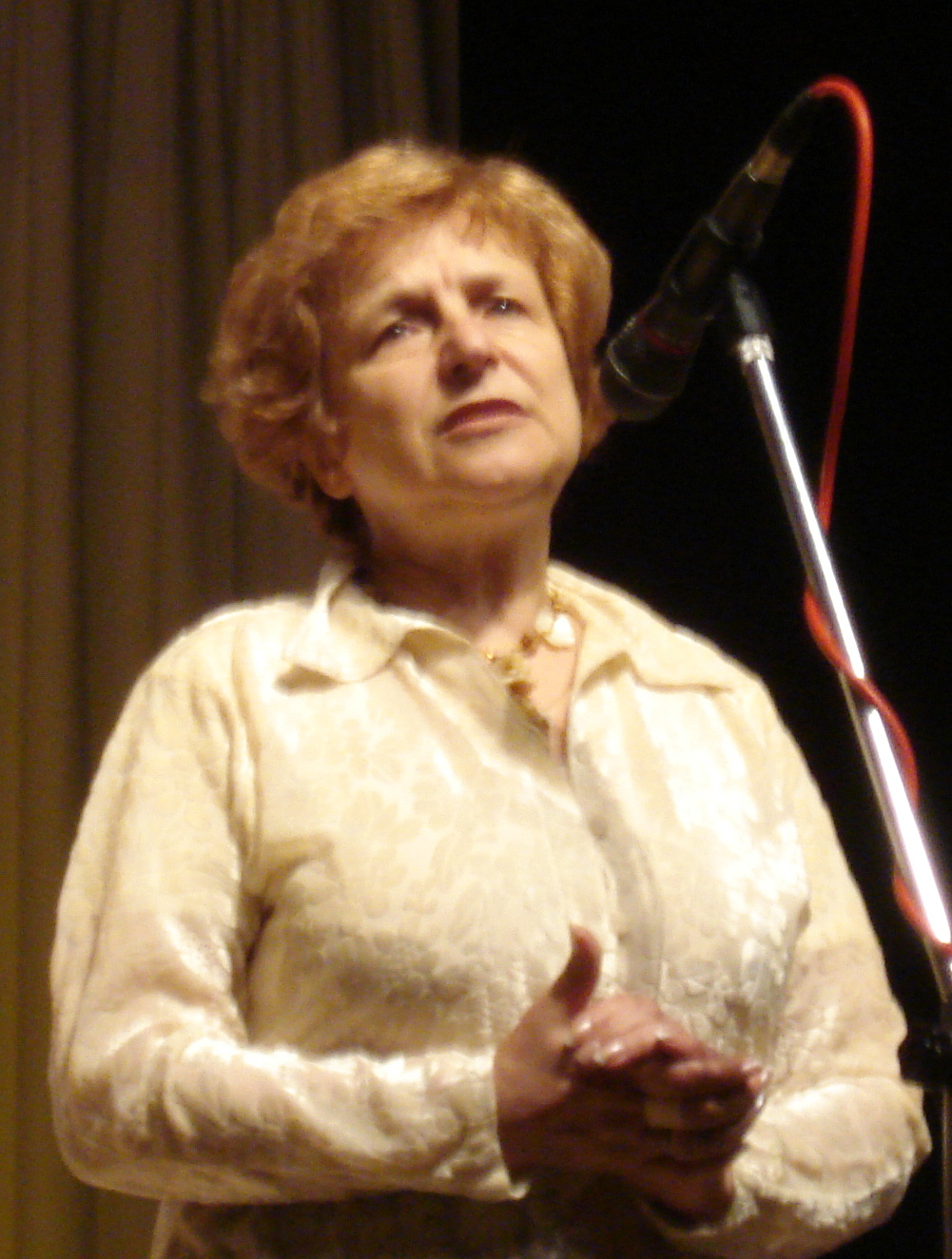 Tatjana Ždanoka (born 1950), Member of the European Parliament, speeking during a ceremony for literary Jurij Dolgorukij award in Riga. Татьяна Аркадьевна Жданок, Сопредседатель правления партии ЗаПЧЕЛ, депутат Европейского парламента, на церемонии вручения литературной премии имени Юрия Долгорукого (Рига, Дом Москвы)